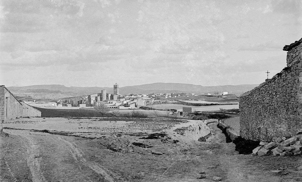 Imatge